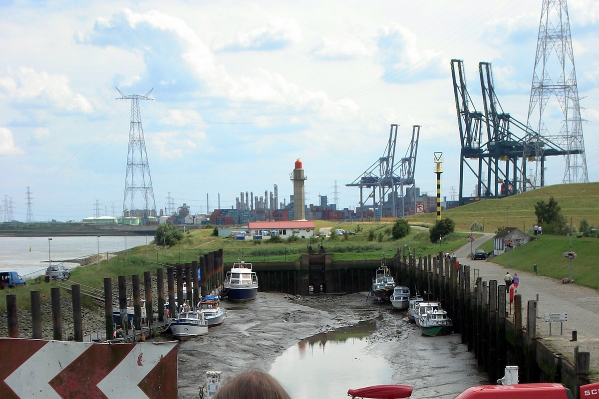 Doel; jachthaven (getijdedok). Achtergrond: Deurganckdok. Doel (Belgique): port de plaisance (bassin à marée). A l'arrière-plan: le bassin Deurganckdok.